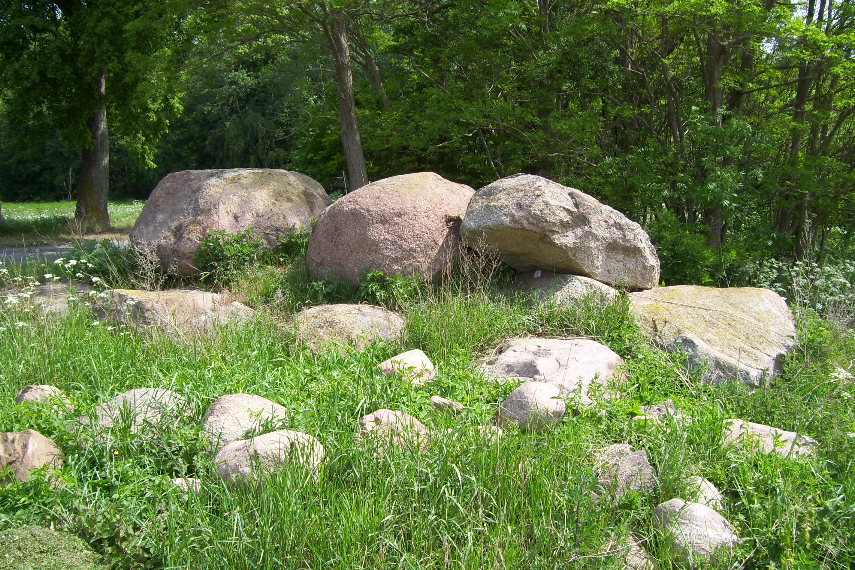 Großsteingrab Vargatz, Gemeinde Bandelin